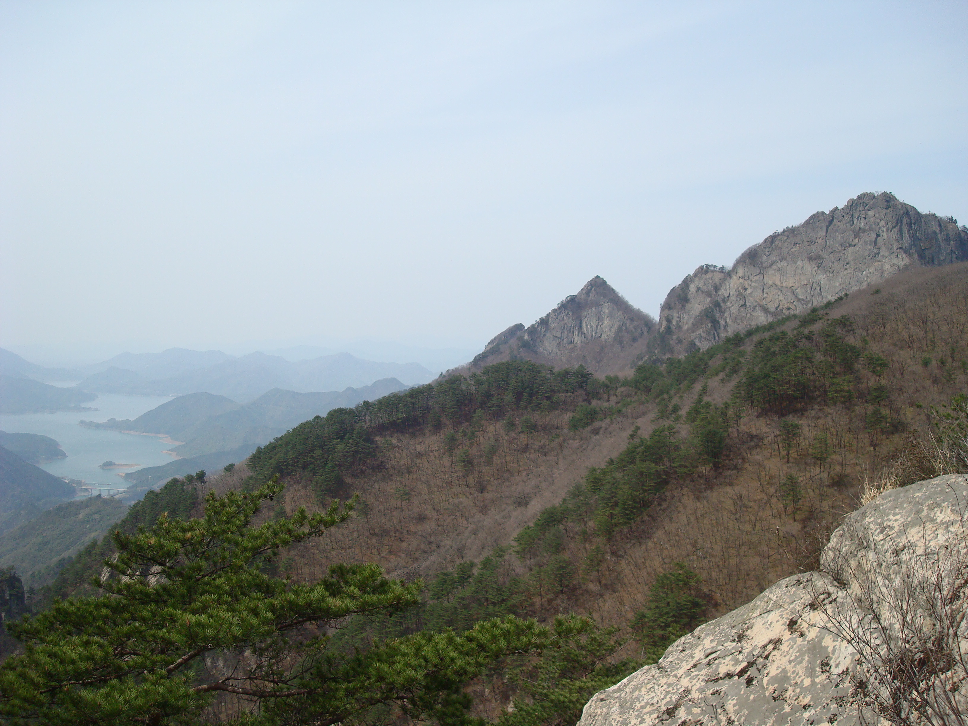 Mt. Worak